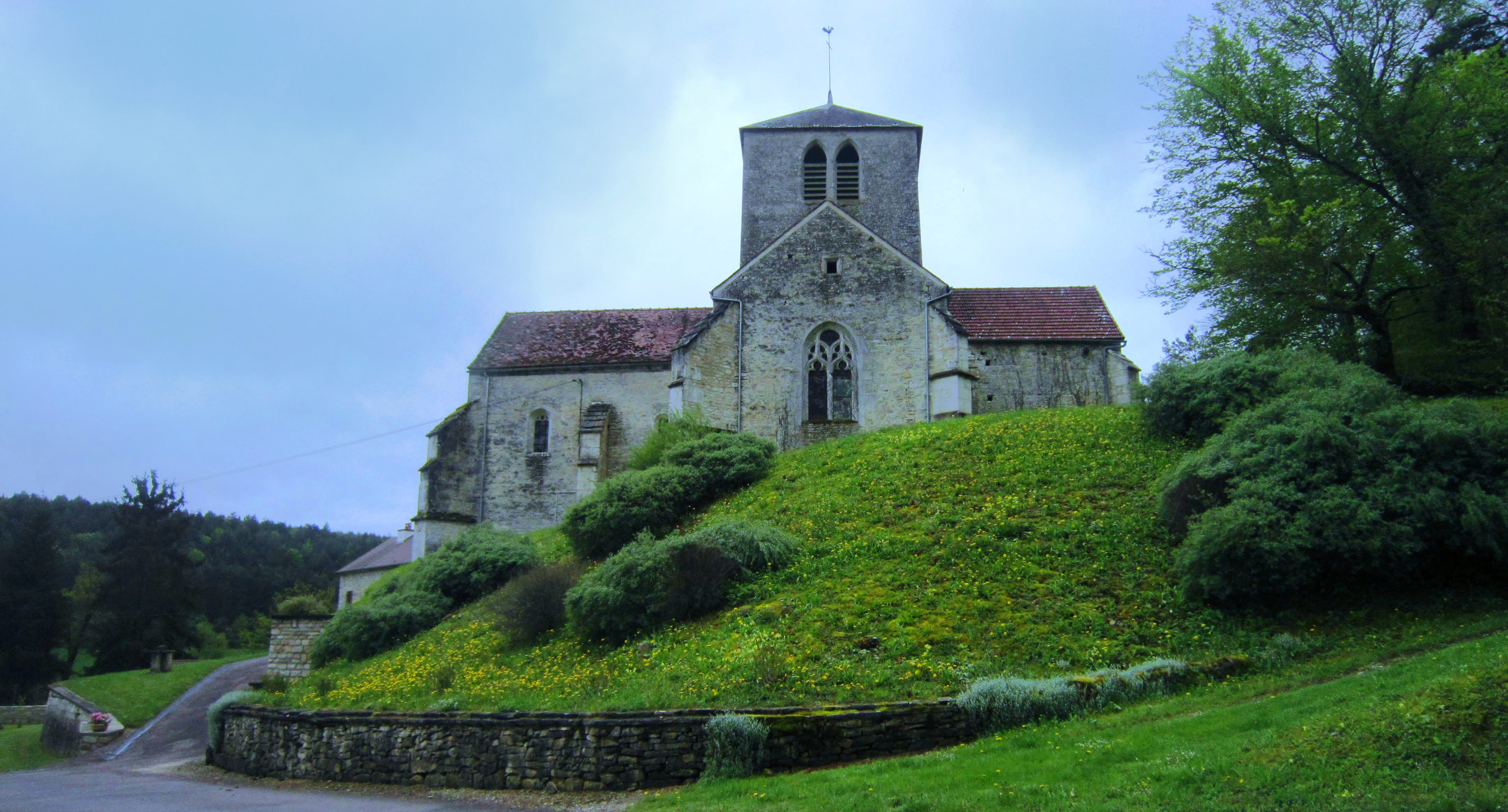 Eglise Saint-Pierre de Noiron-sur-Seine (Côte-d'Or)